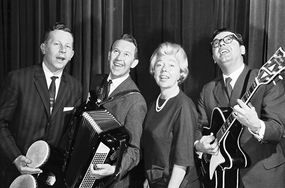 Freiburg: Stadttheater; „SWF, Josephine Baker“; Friedel Hensch und die Cyprys (v.l.n.r.: Hans-Joachim Kipka, Karl Geithner, Friedel Hensch, Werner Cyprys)